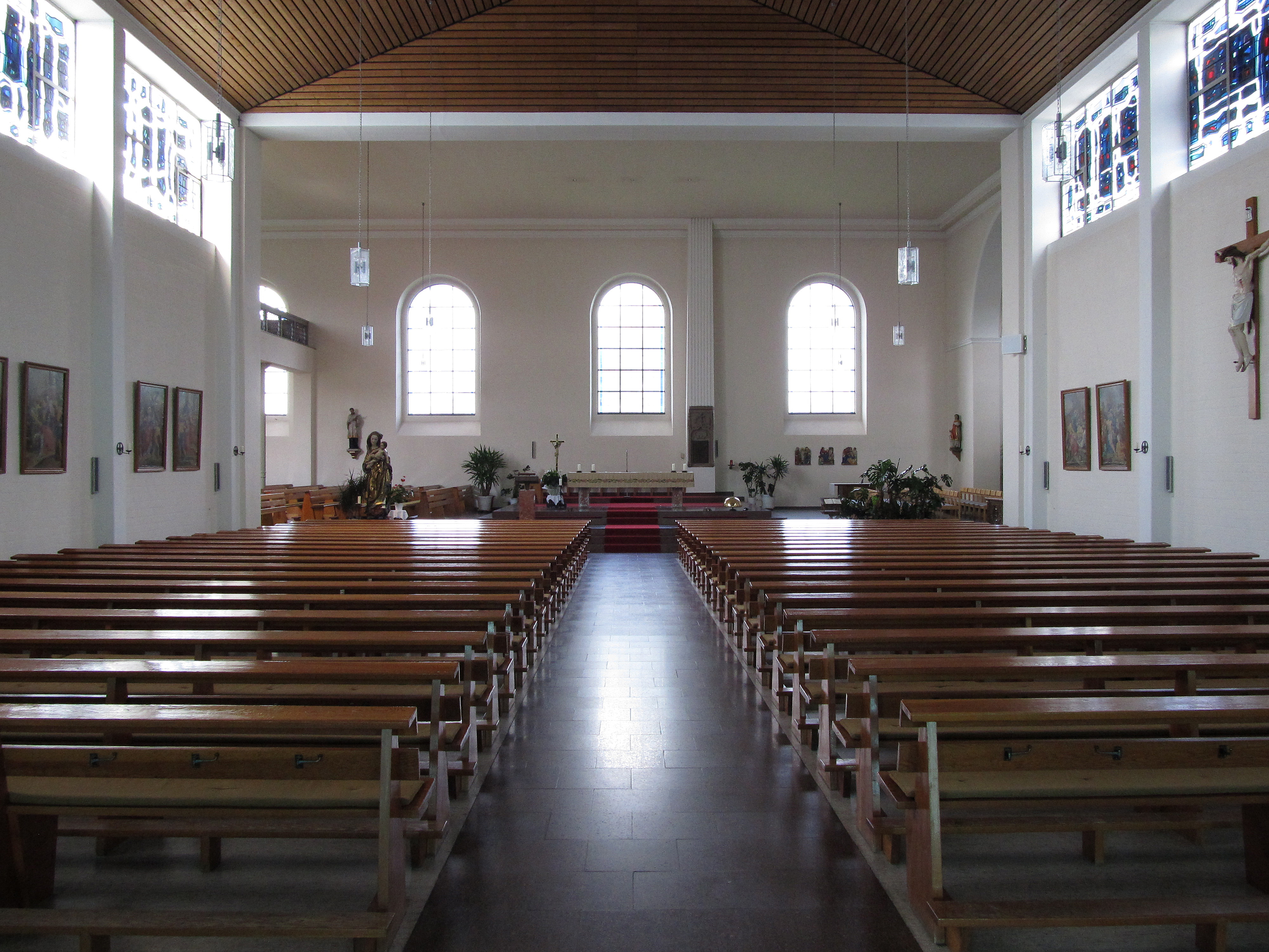 Blick ins Innere der katholischen Pfarrkirche Mariä Heimsuchung in Ommersheim, Mandelbachtal, Saarland